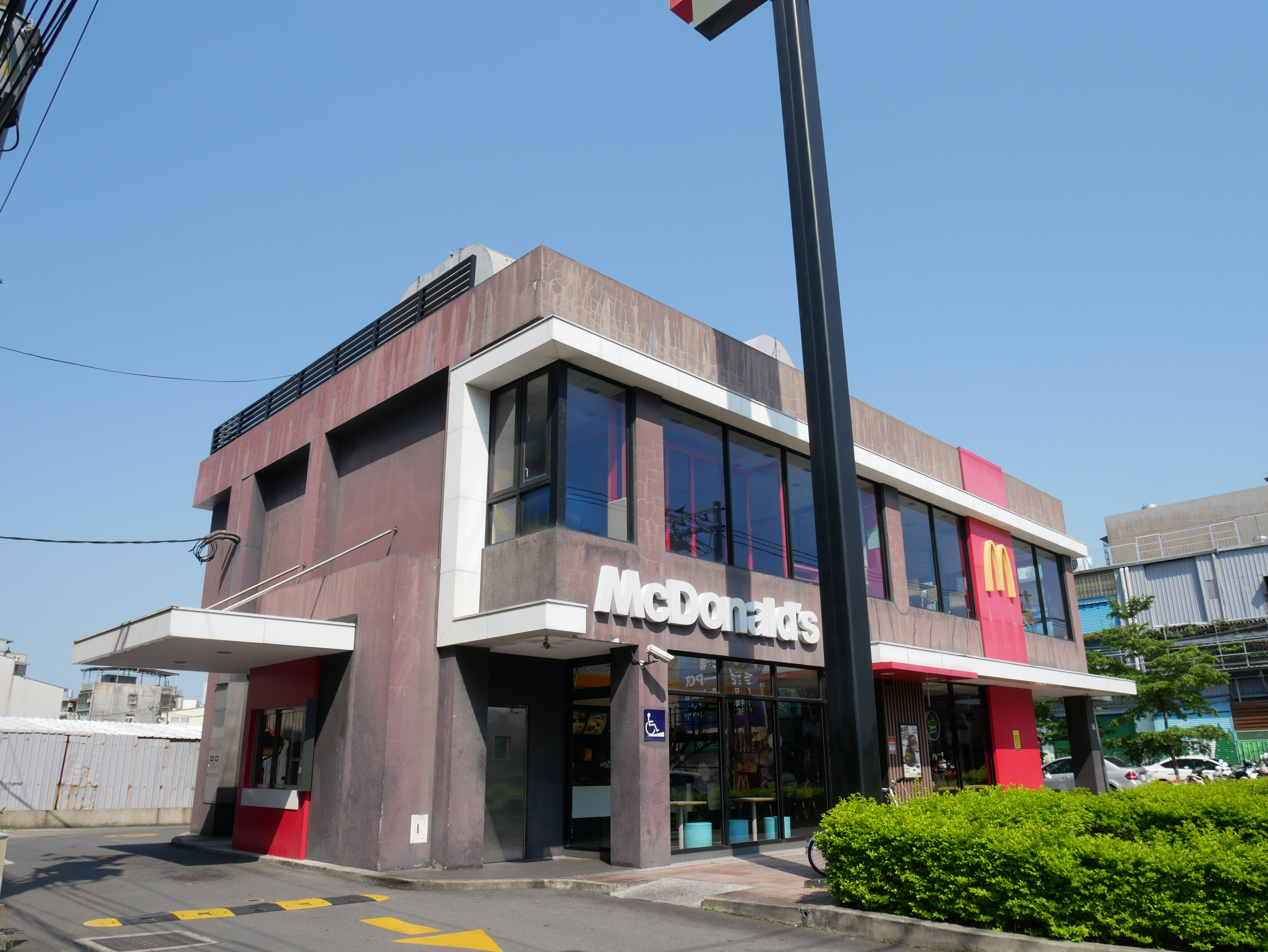 中文（台灣）: 麥當勞鶯歌鶯桃店，新北市鶯歌區鳳祥里